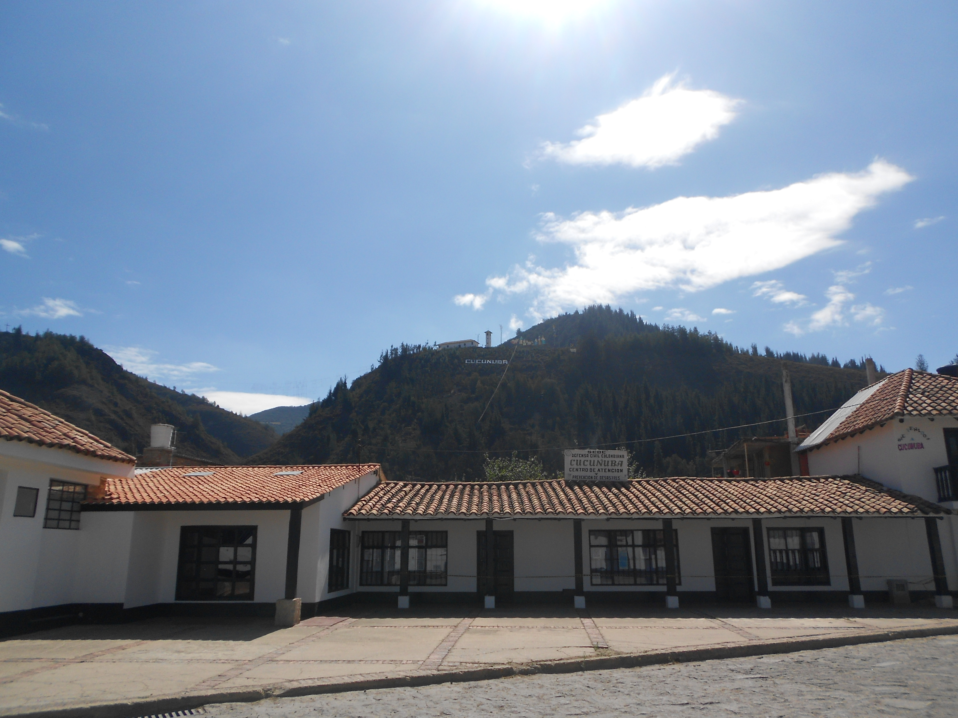 Zona urbana del bello pueblo de Cucunuba, sus calles, sus, parques,su iglesia, todo su interior que evoca la paz y costumbres sanas de su gente y del lugar. Esta fotografía fue tomada en un área protegida de Colombia con el código 1221 del RUNAP.